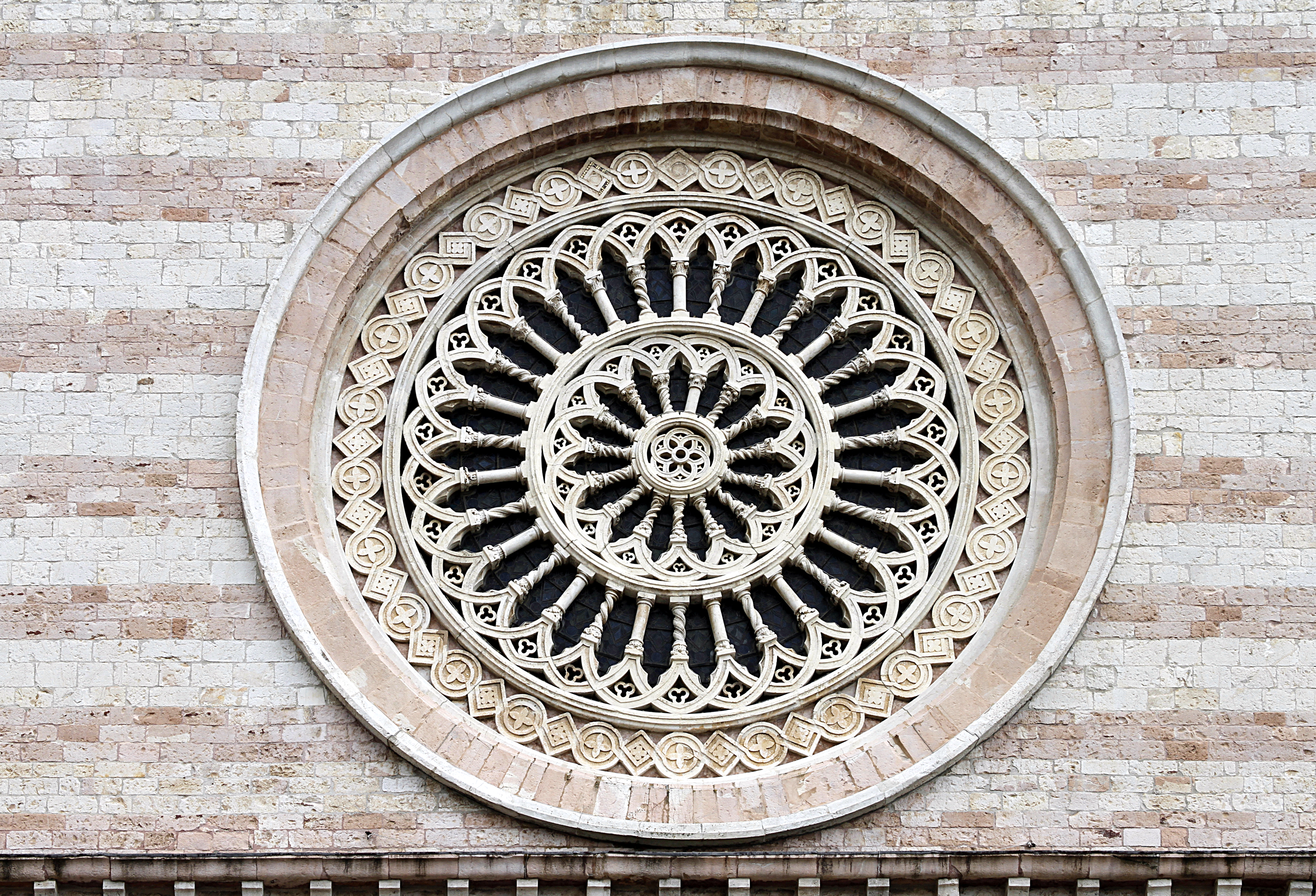 Santa Chiara - Assisi